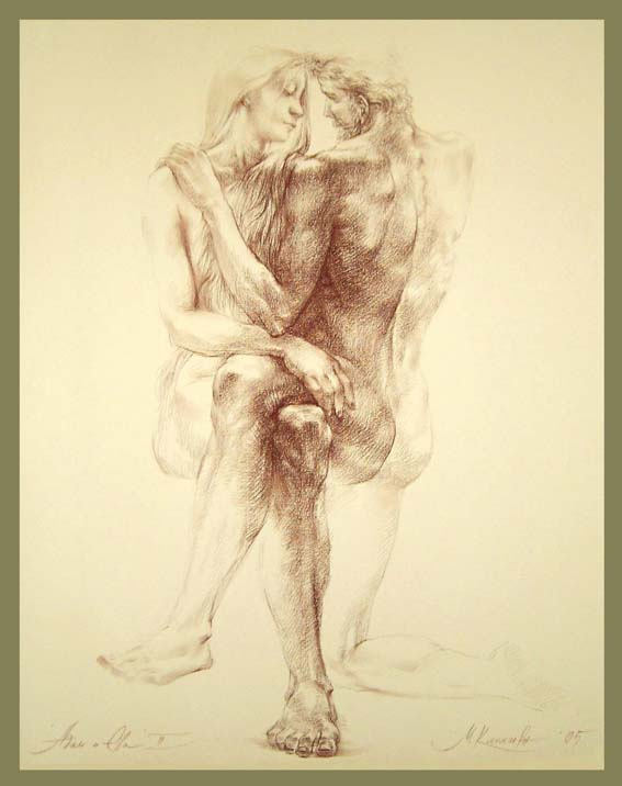 Адам и Ева II